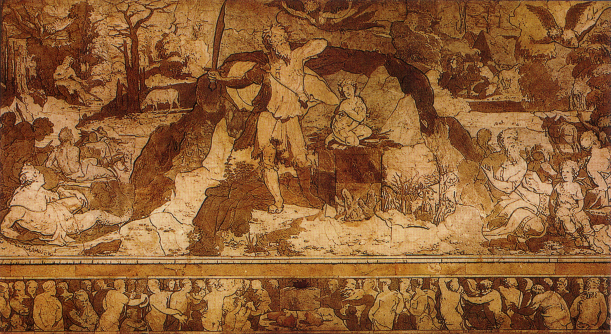 Pavimento di siena, marcia del popolo ebraico verso la terra promessa e sacrificio di isacco (beccafumi)